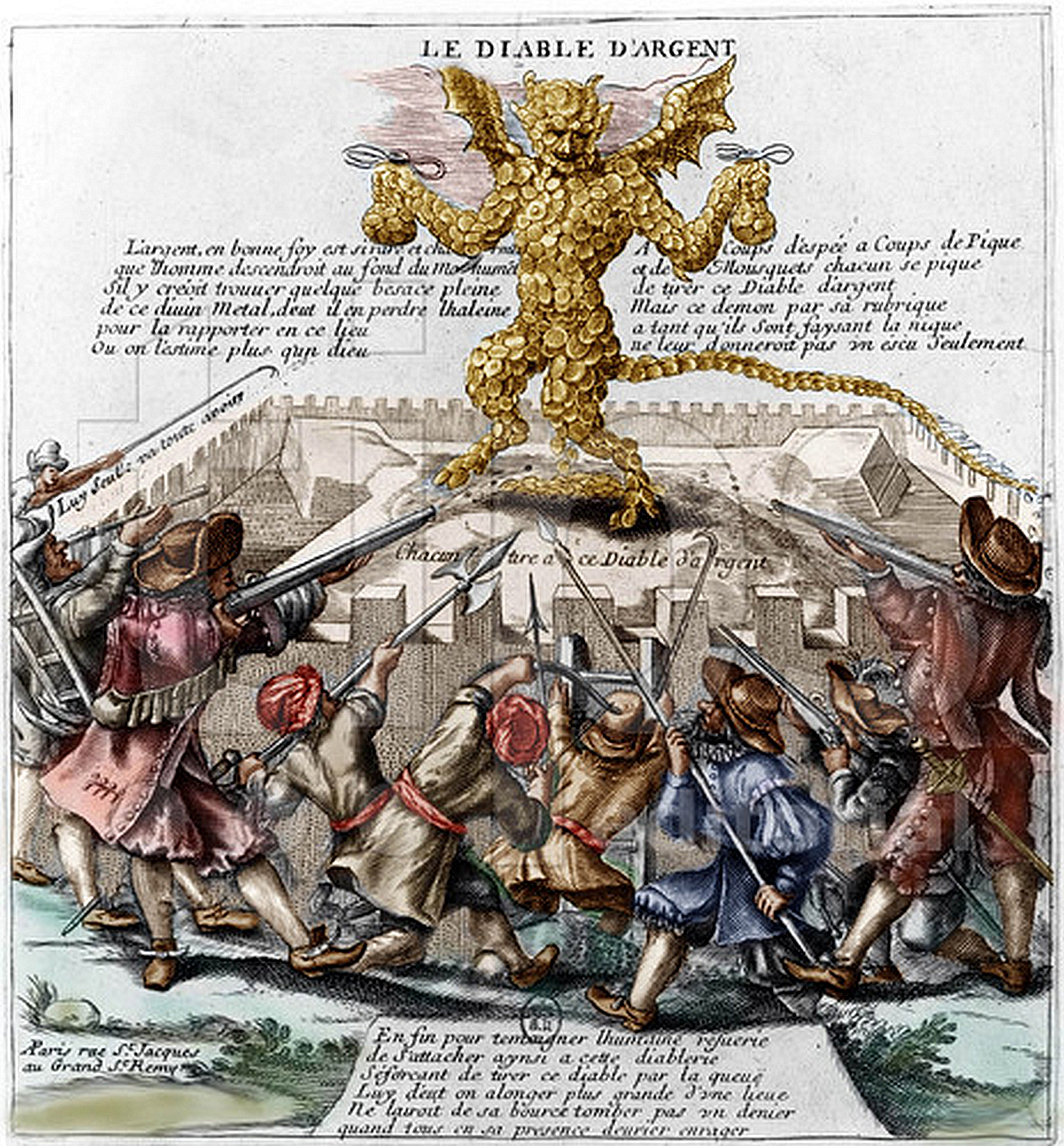 Le Diable d'Argent - L' effondrement du systeme de Law (John Law)